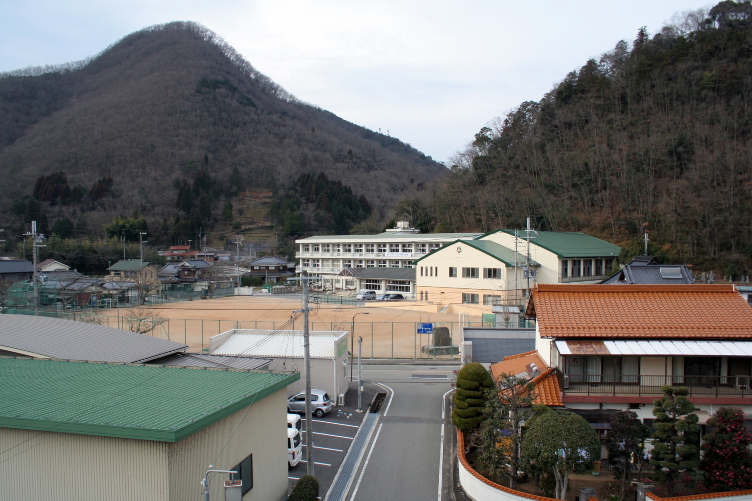 久崎駅1番ホームより見た駅西側の町並みの様子。中央の建物は佐用町立久崎小学校。